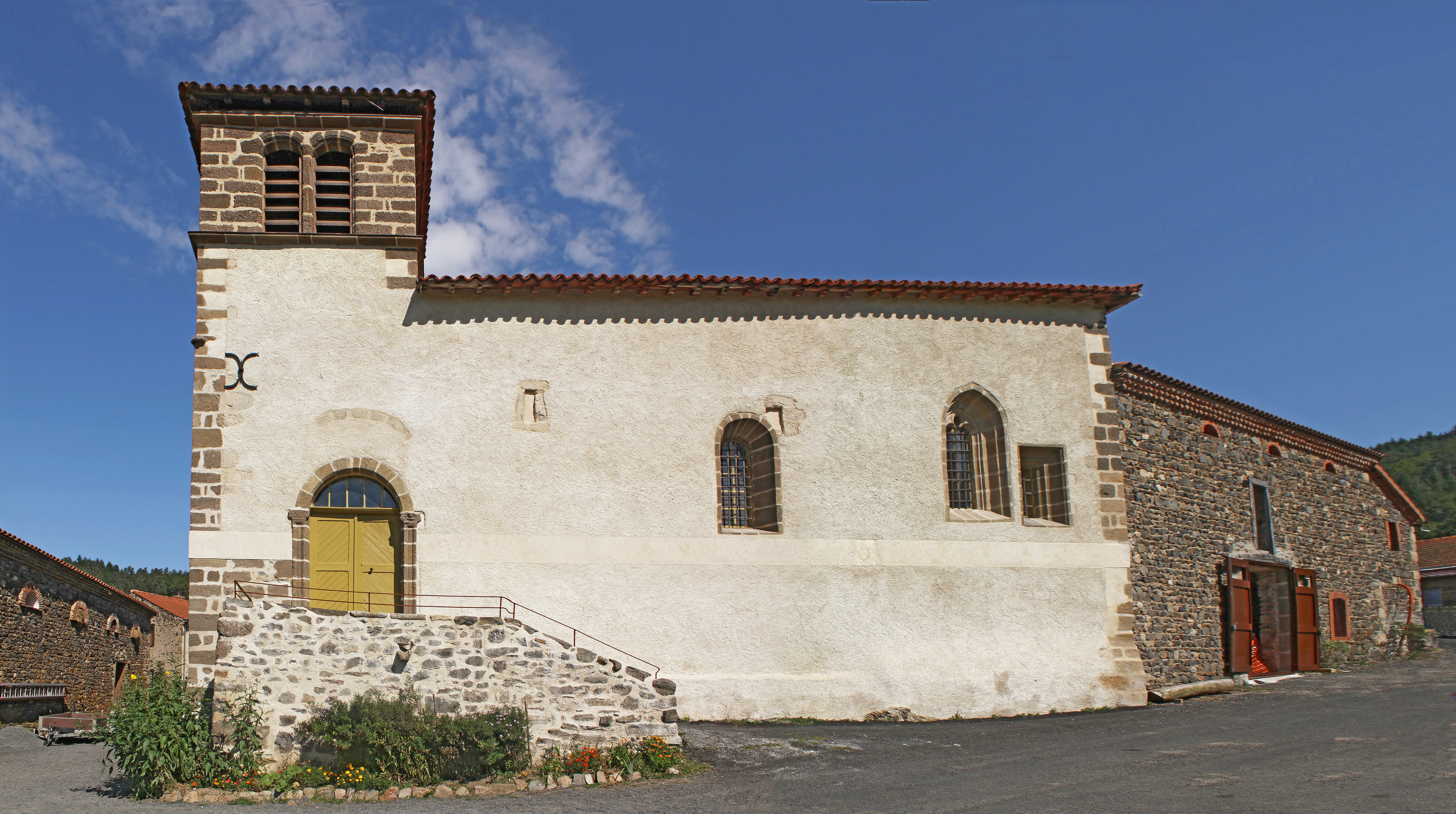 Église Saint-Paul de Vals-le-Chastel